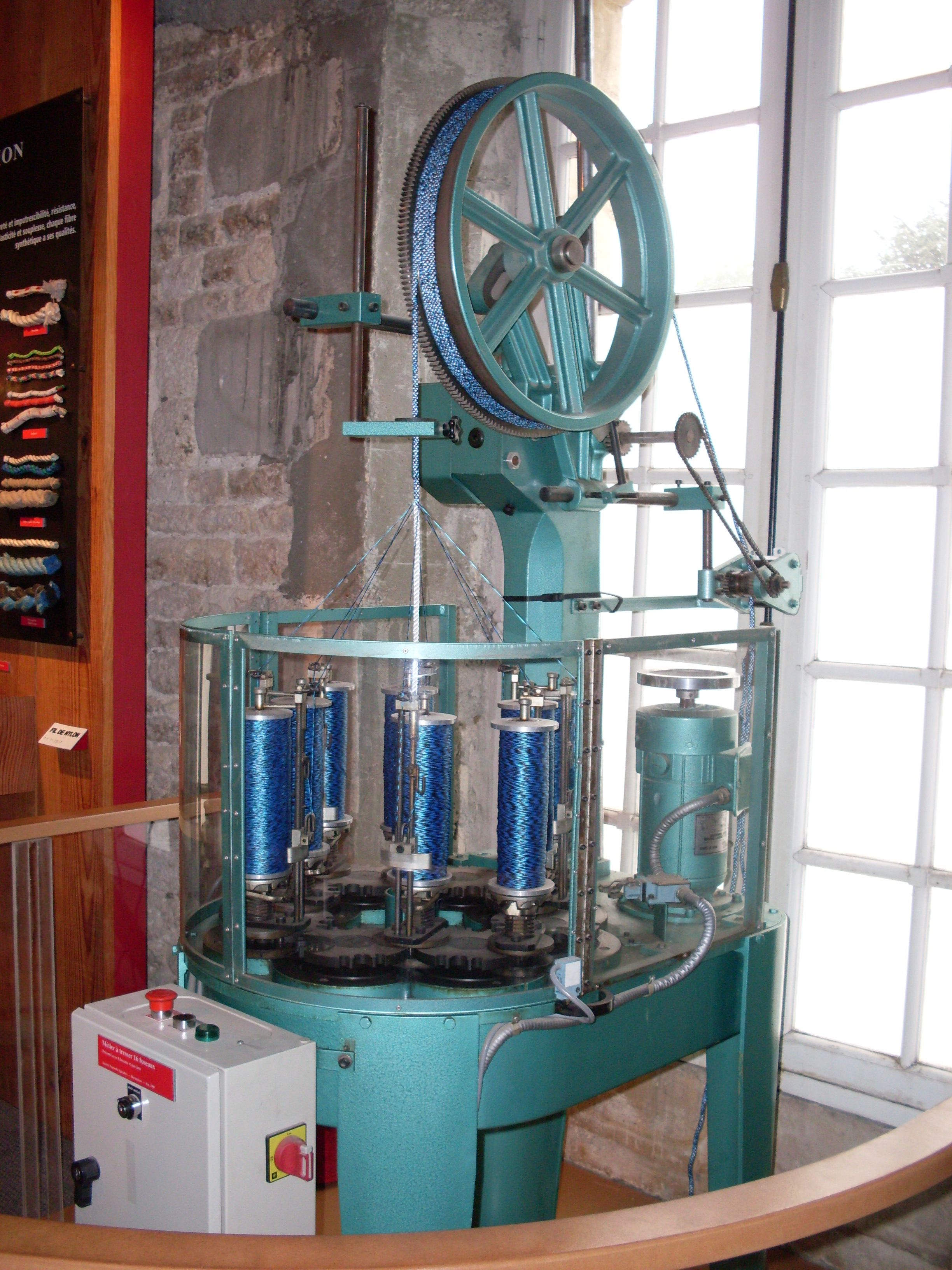 Corderie royale - métier à tresser 16 fuseaux, Rochefort, Charente-Maritime